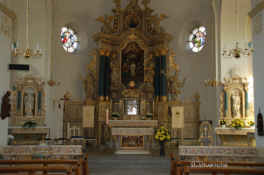 Hauptaltar der St. Vituskirche in St. Vit